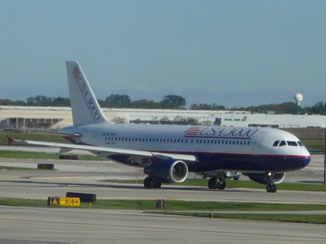 USA 3000 Airbus A320